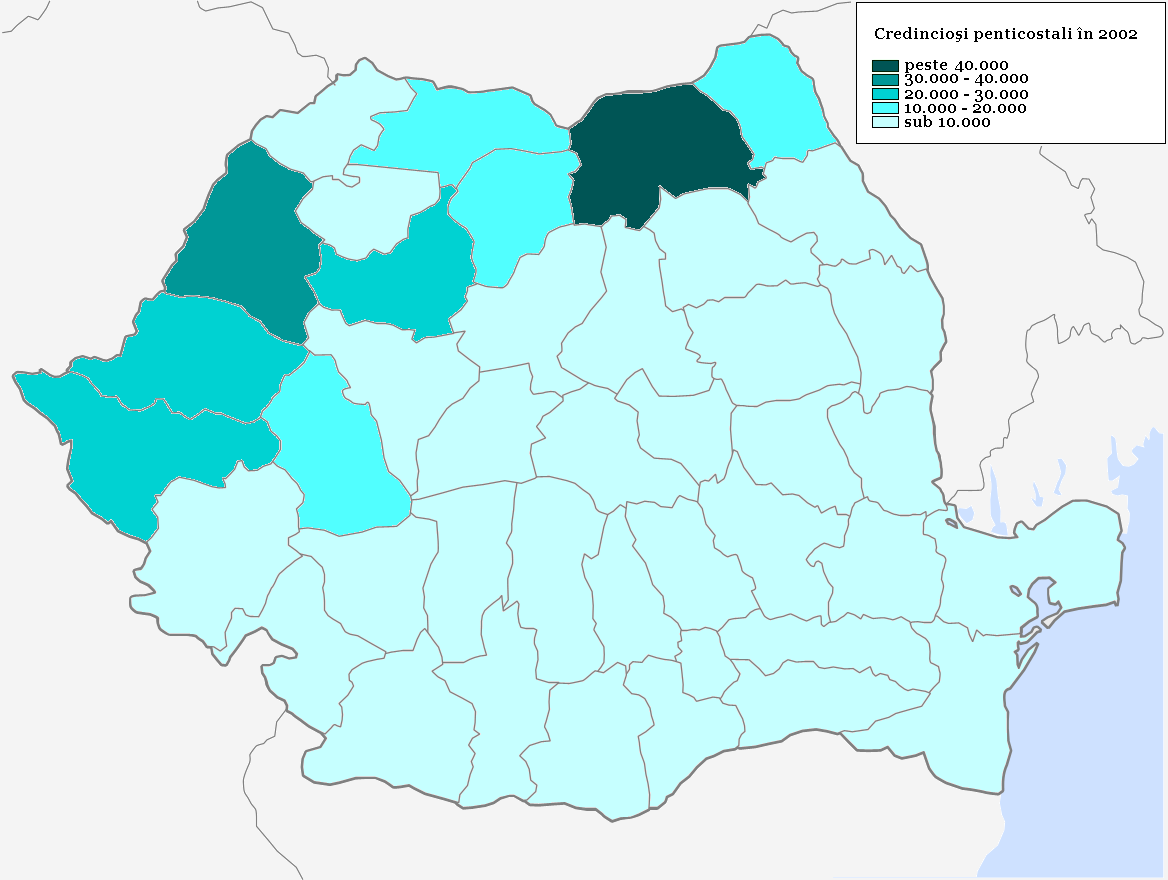 Numarul credincioşilor penticostali din România, pe judeţe.